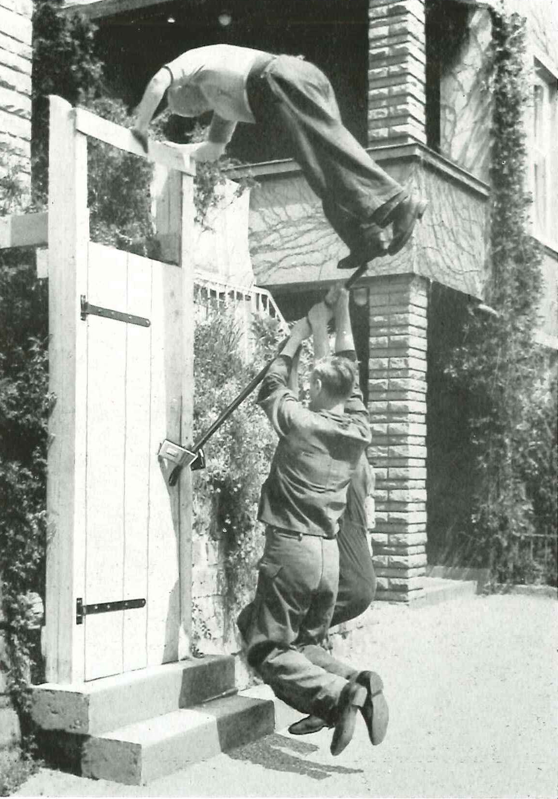 Drei Männer versuchen in den 1950er-Jahren eine Panzer-Überfalle von Burg-Wächter zu knacken.